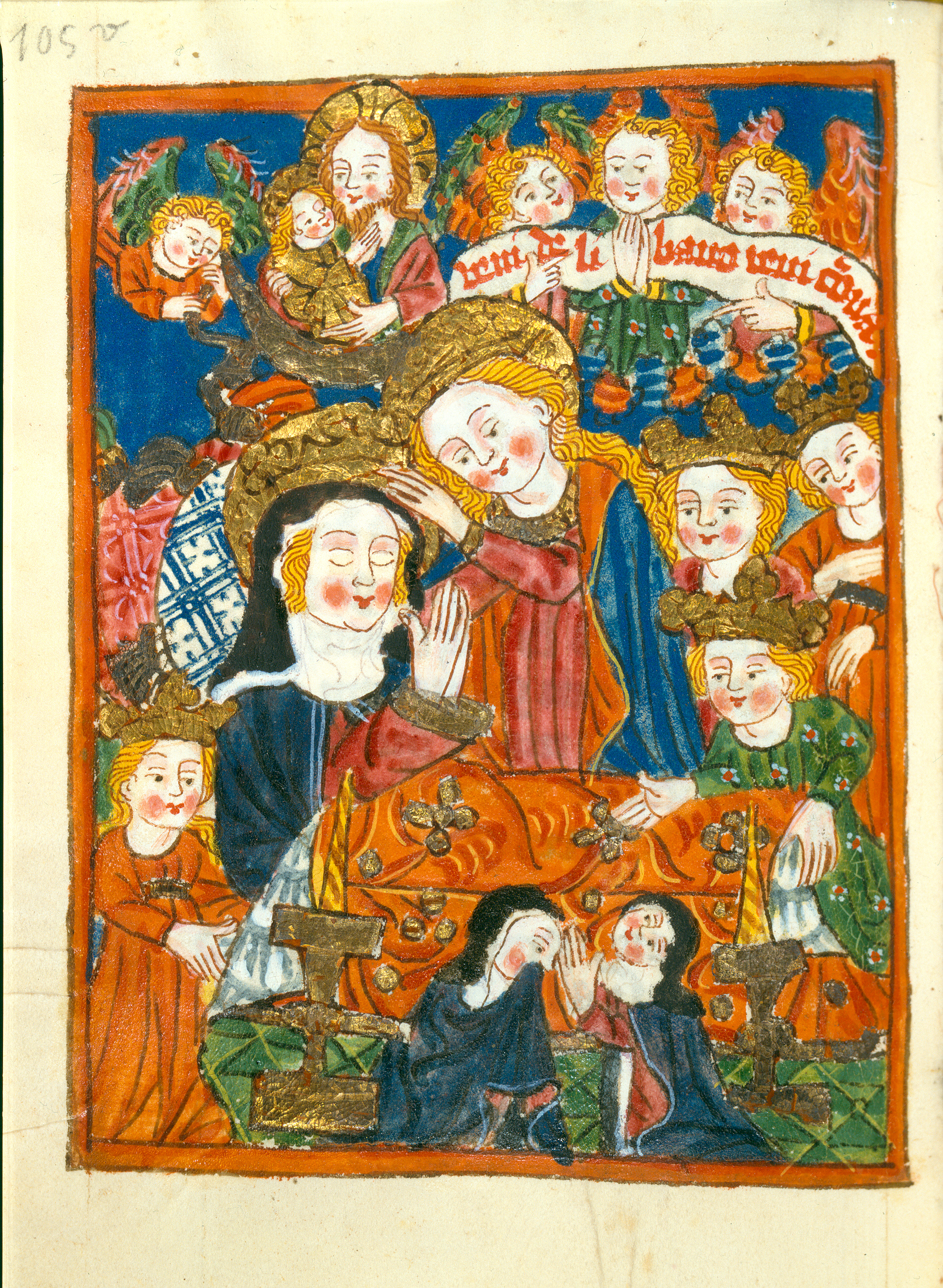 Tod der heiligen Klara Badische Landesbibliothek, Karlsruhe, Codex Tennenbach 4, fol. 105v